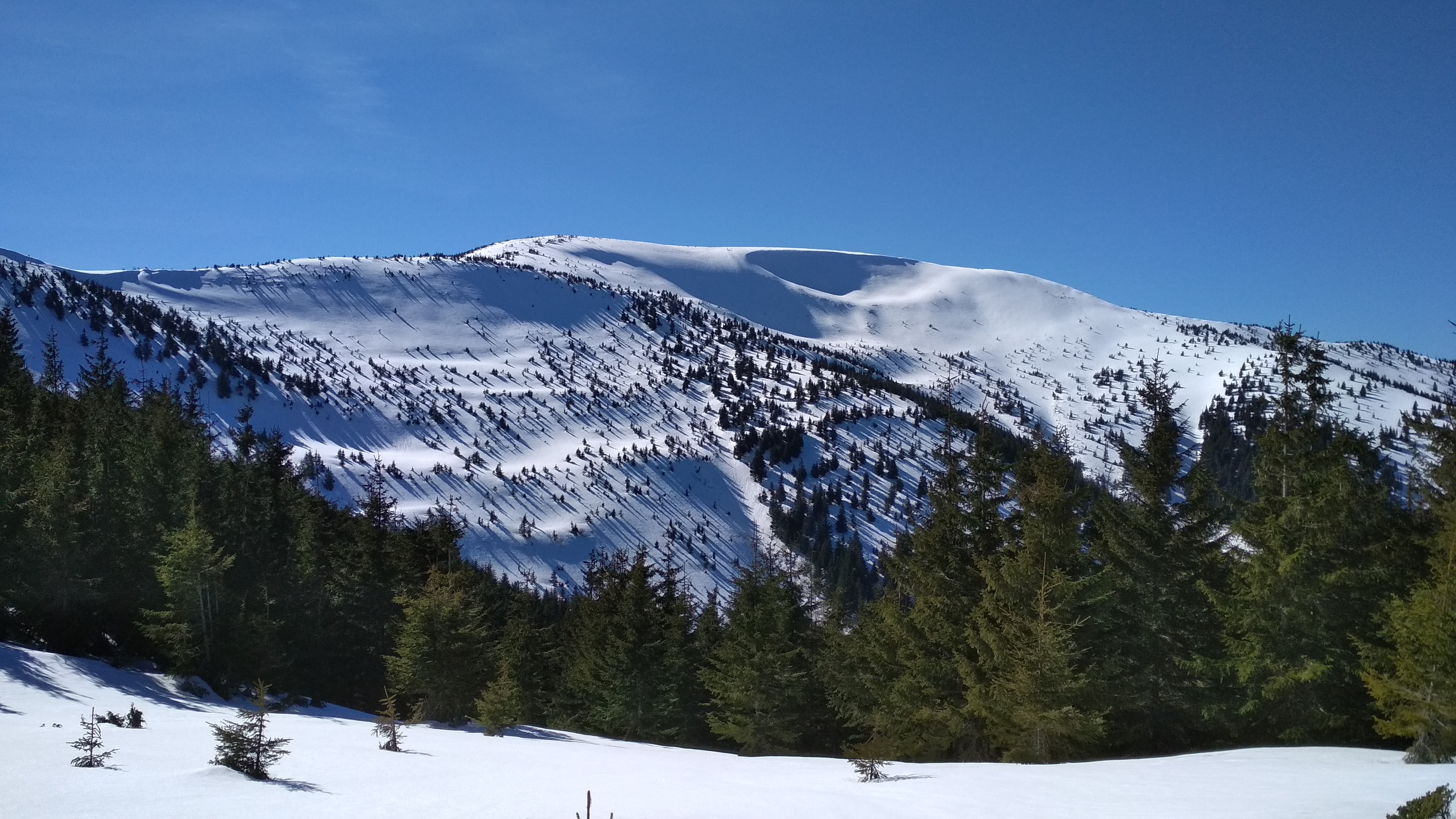 З чорного маршруту. Гора Дурня весною